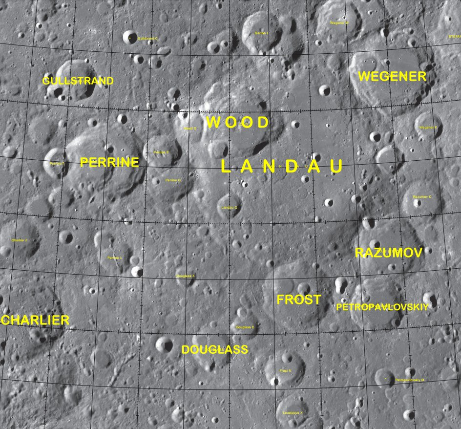 Cráter lunar Frost. Localización. (Imagen LRO)